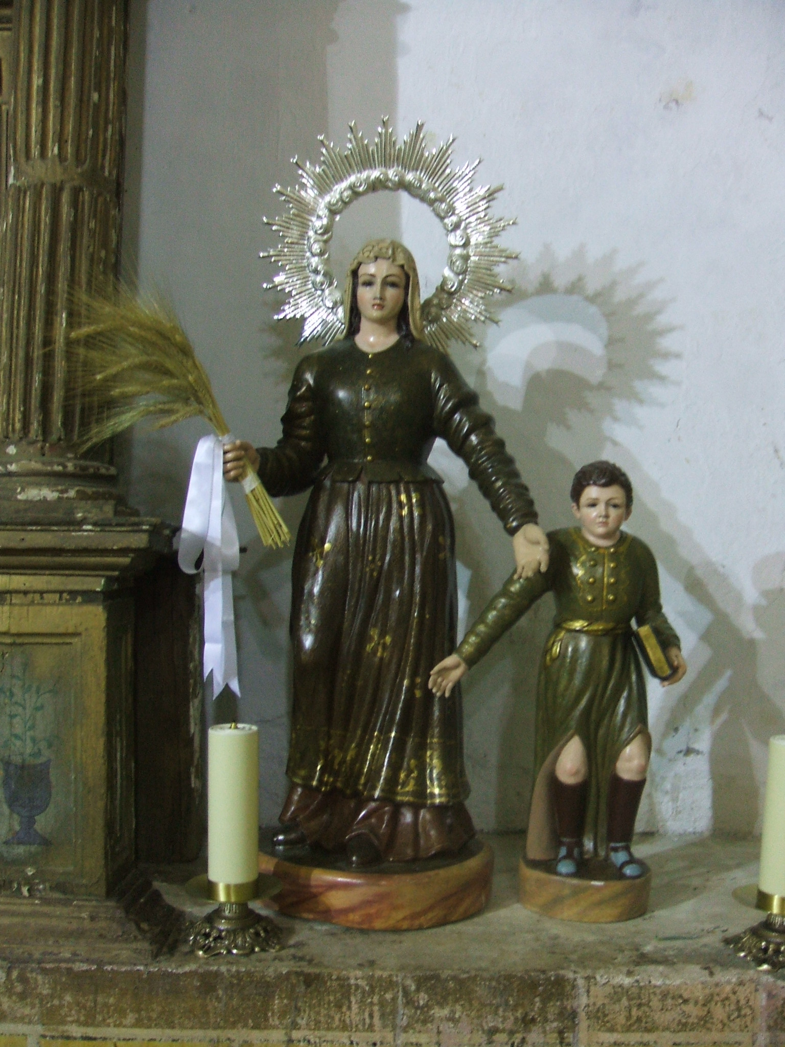 Santa Julita y Quirico según imágenes de la iglesia parroquial de Villanueva de la Sierra (Cáceres)